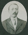 鎮西学院の日本人初代院長笹森卯一郎